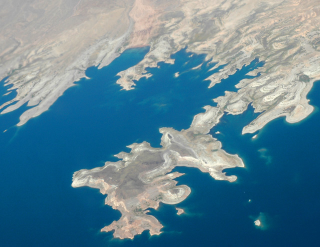 Lake Mead, Nevada, USA